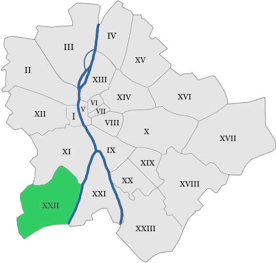 map hungary budapest district 22